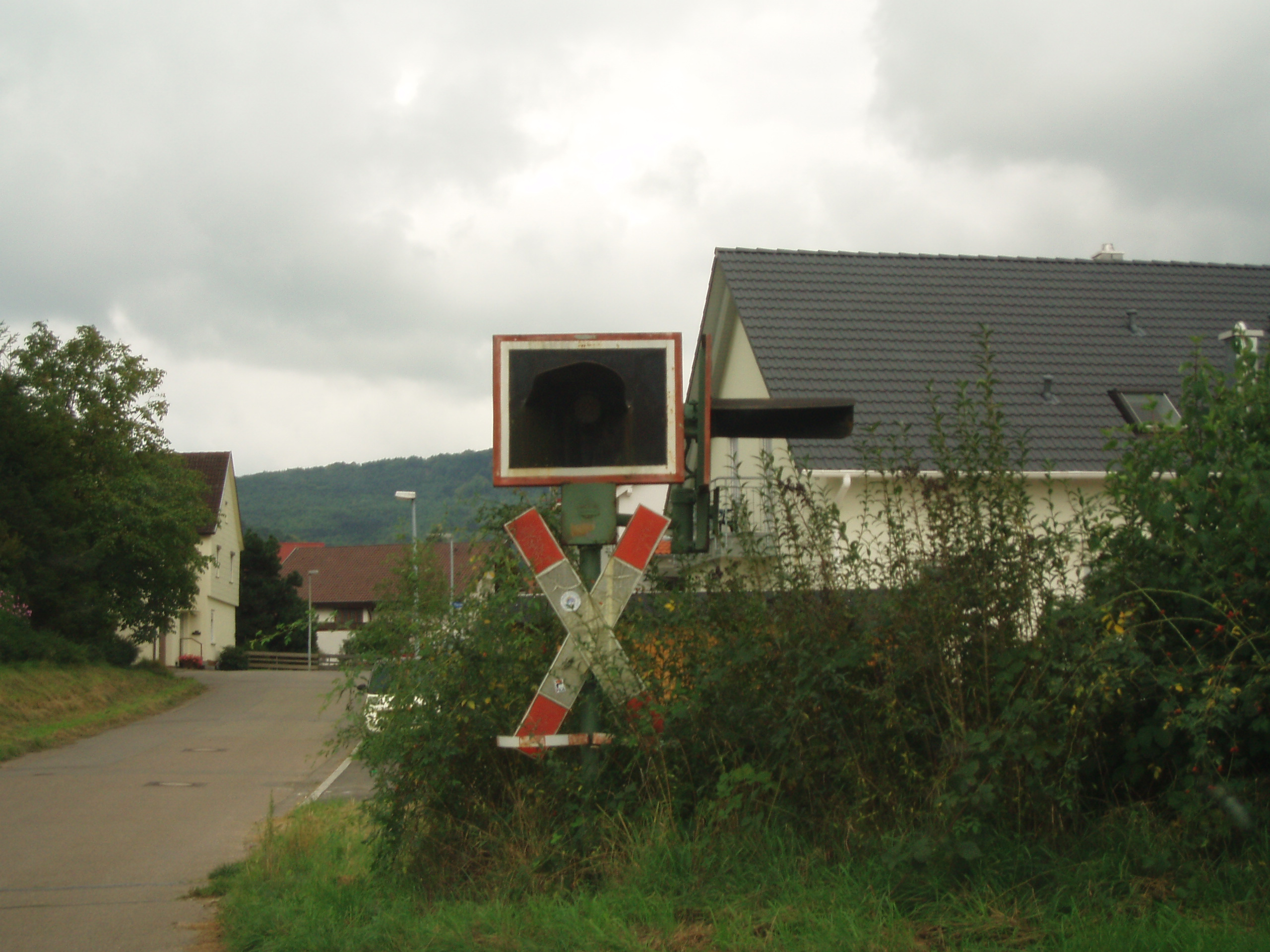 Dürnau, Bahnübergangsreste